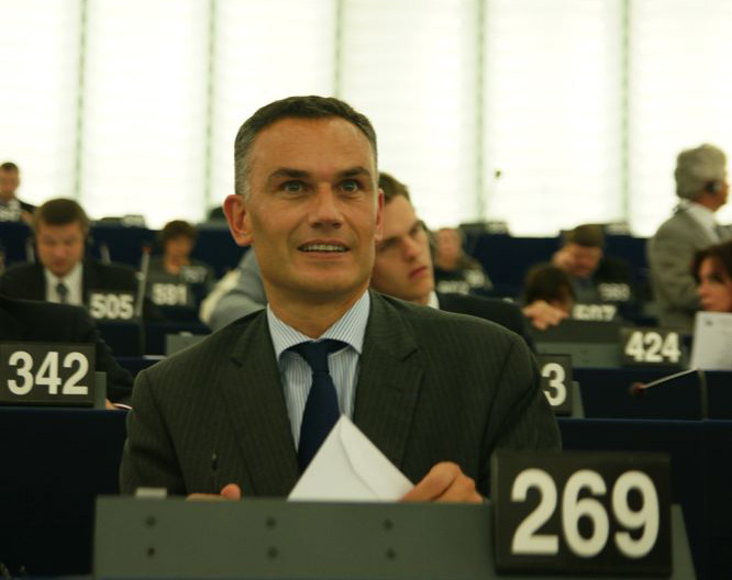 14 Juillet 2009, session inaugurale du Parlement Européen